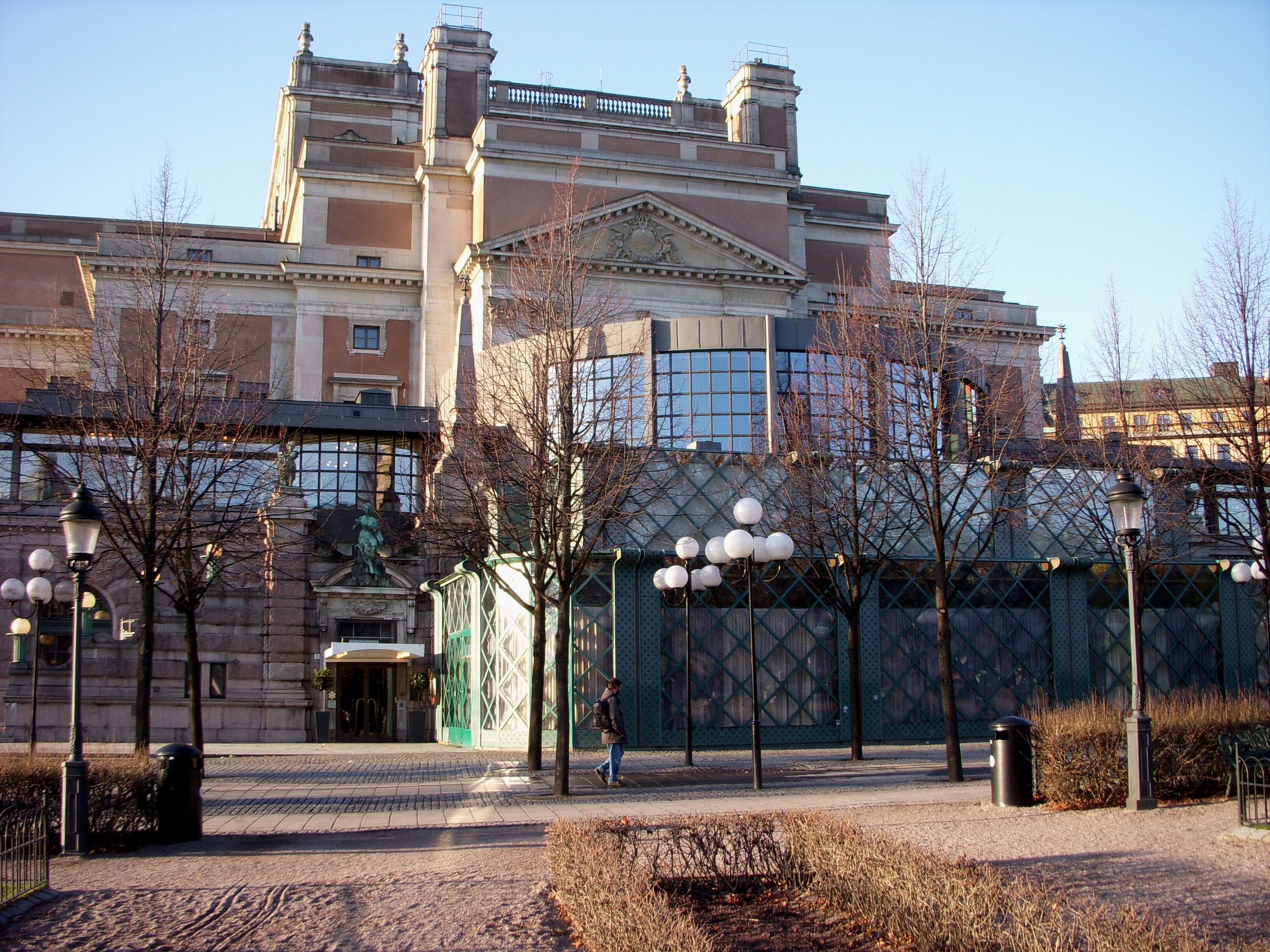 Operakällaren i Stockholm